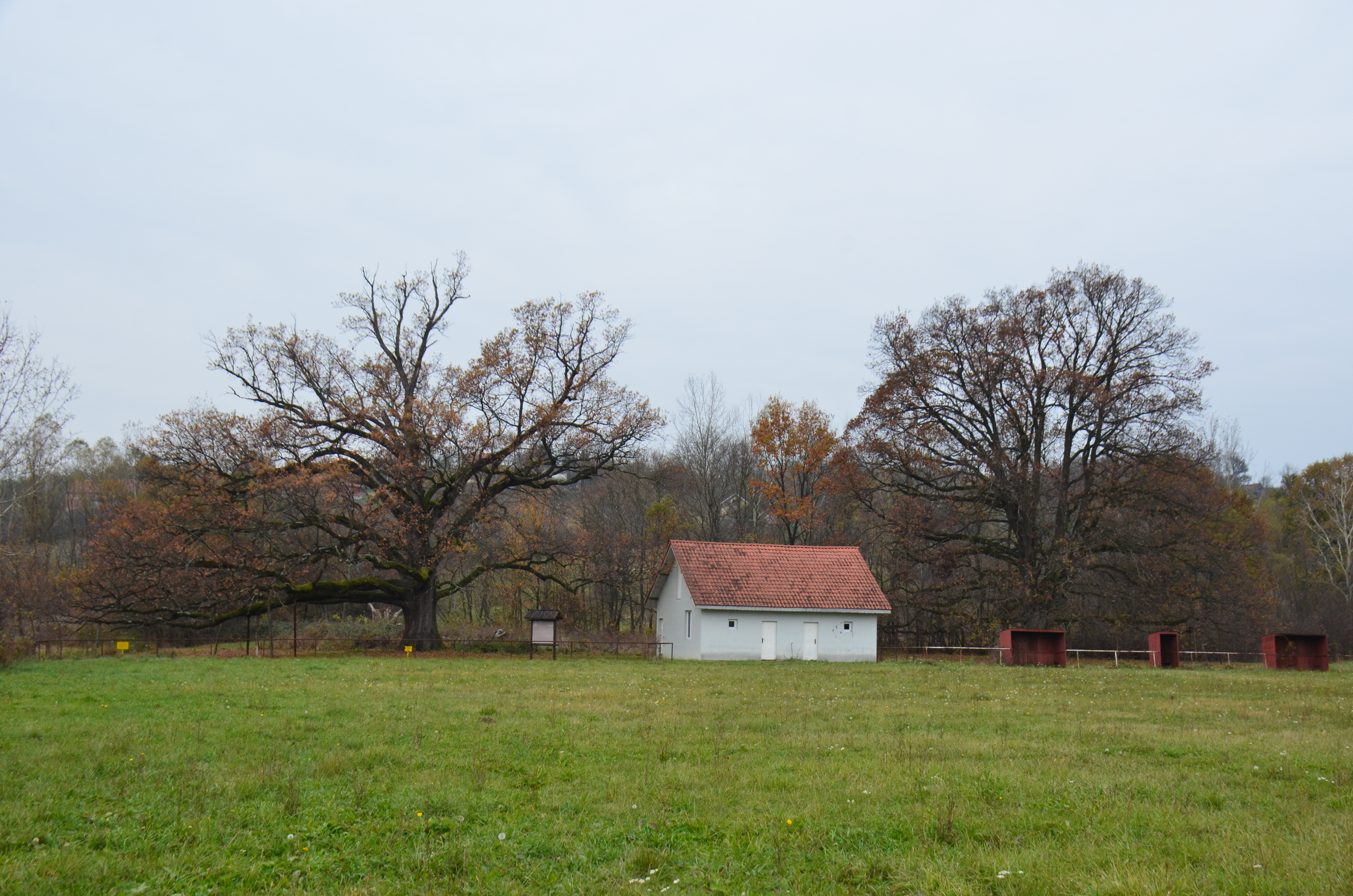 Српски (ћирилица): Запис - Три храста - већи, село Шиљаковац, Општина Барајево, Град Београд, Србија